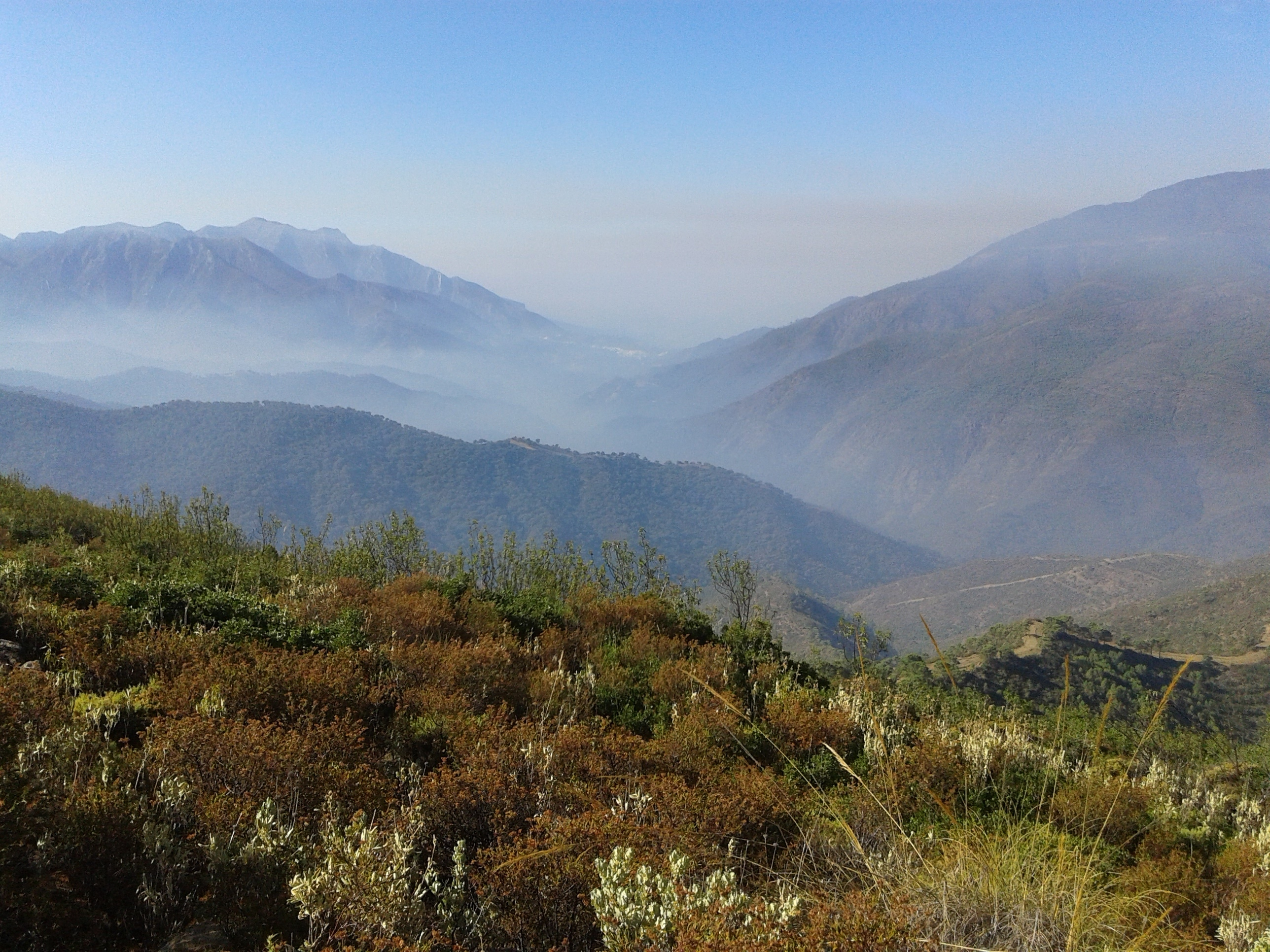 Costa de Marbella desde la Sierra de Tolox en un día con un incendio forestal